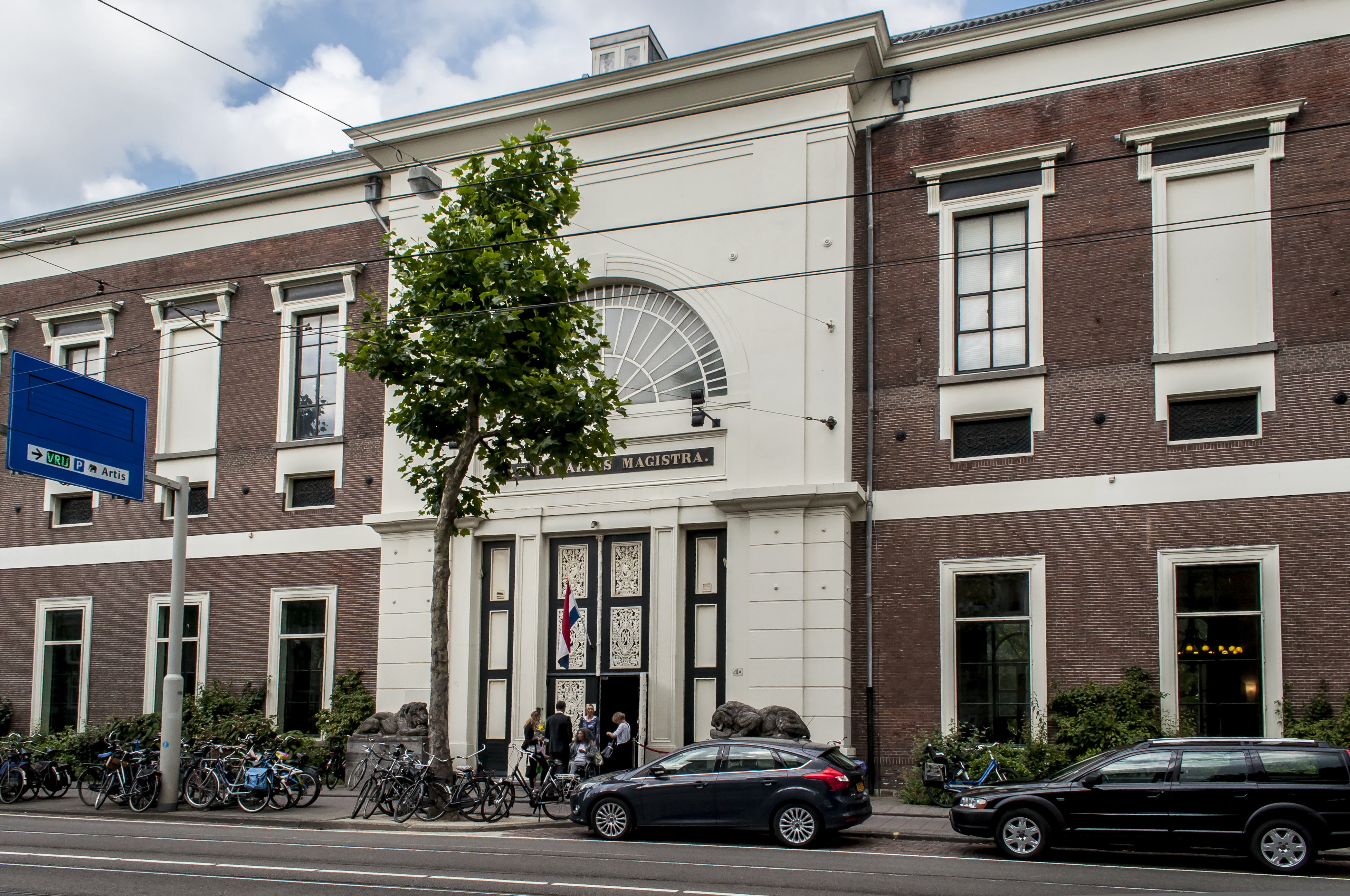 Artis, Amsterdam. Het oude Hoofdgebouw (1851), in laat-classicistische trant, met doristisch aandoend halvemaanvenster en gietijzeren ornament in de deuren in de middenrisaliet.